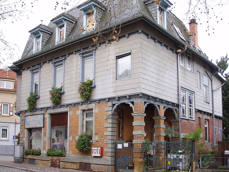 Denkmalgeschütztes Haus Mändle in der Hauptstr. 8 in Heilbronn-Sontheim